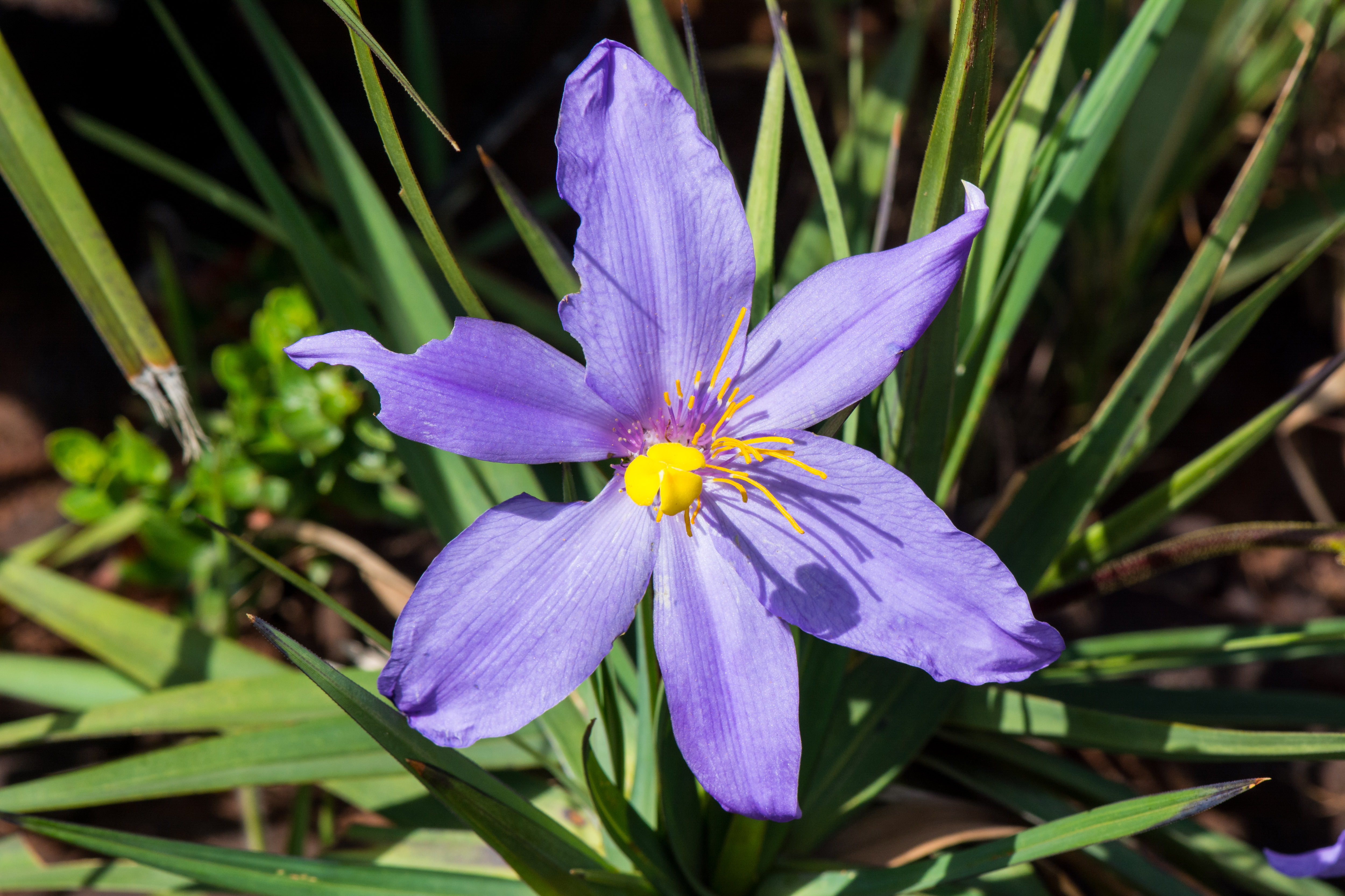 Flor simbolo do PESRM.